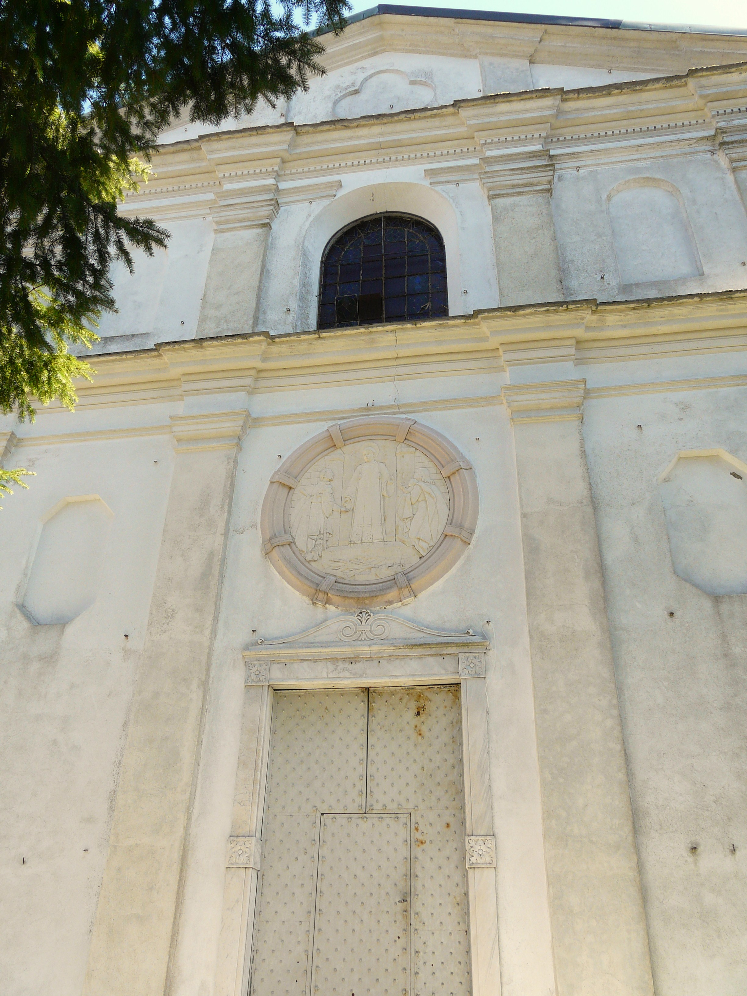 Chiesa di San Lorenzo, Propata, Liguria, Italia